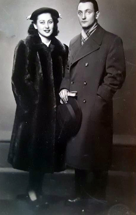 Věra Holotíková a Karel Krumnikl před svatbou v roce 1949